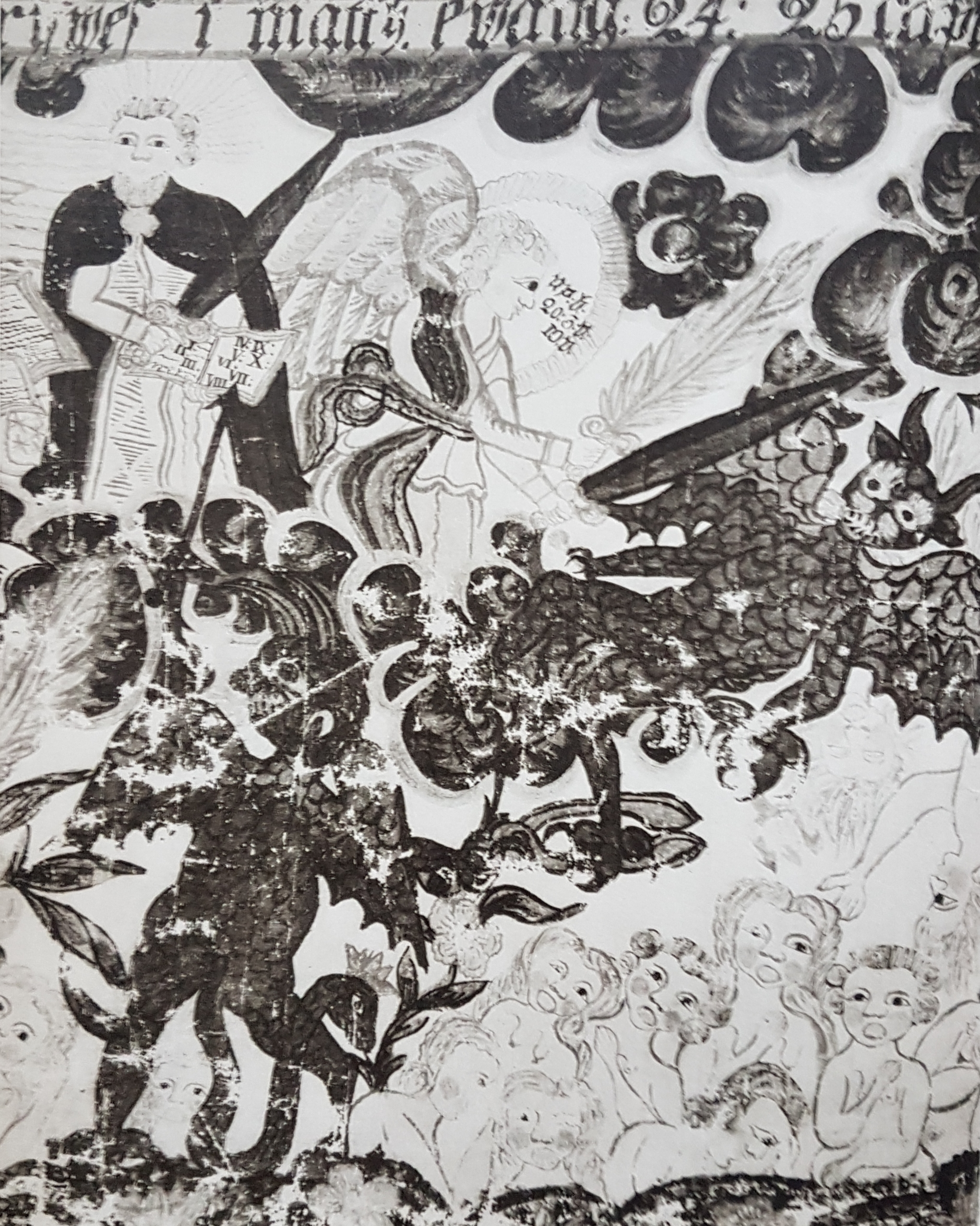 Djävulens nedstörtande skapad av Johannes Magnus Dahlgren, avfotograferad bild från Allhems Svenskt konstnärslexikon.